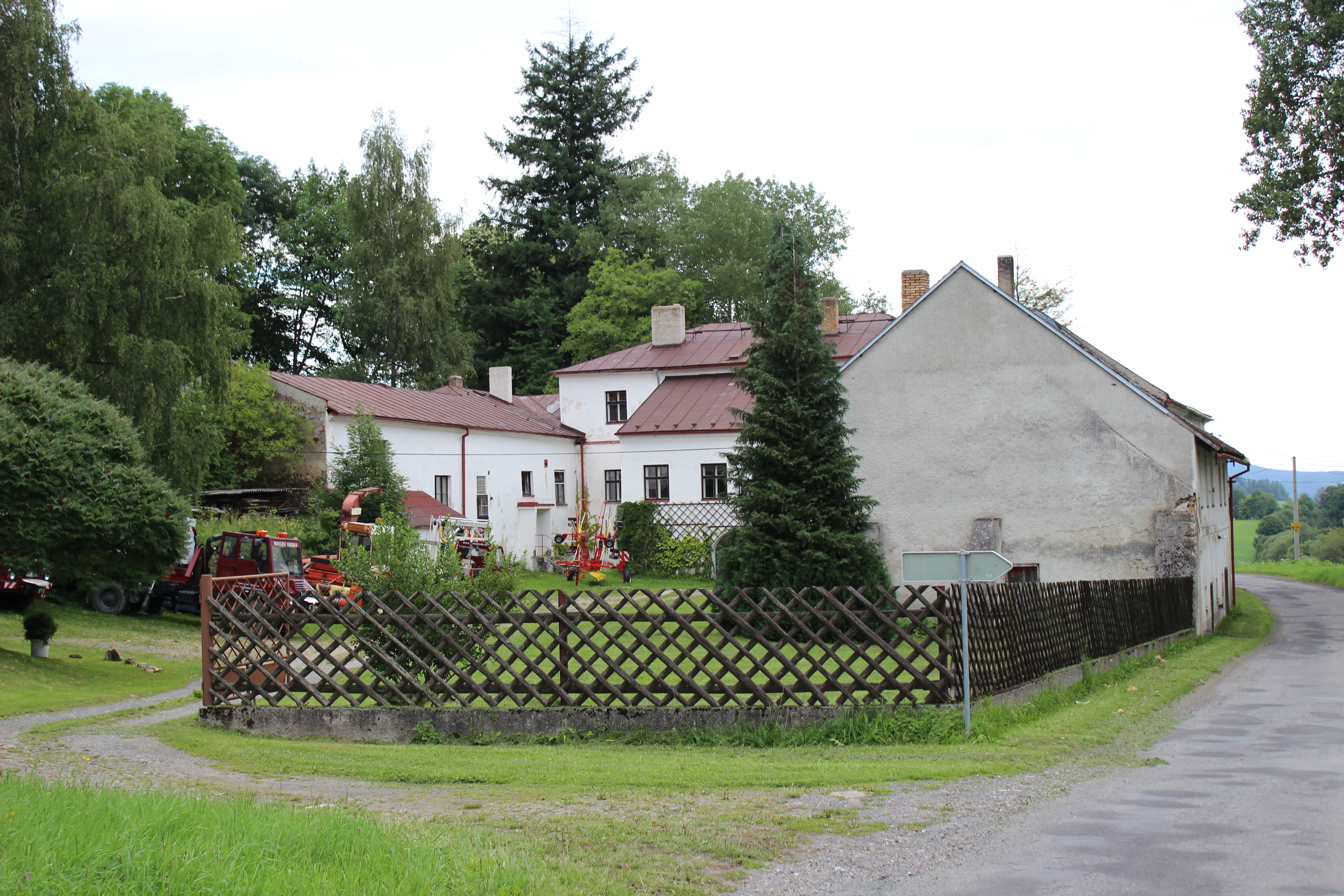 Zámek (dům číslo popisné 1) v Dolejším Těšově (pohled od západu).